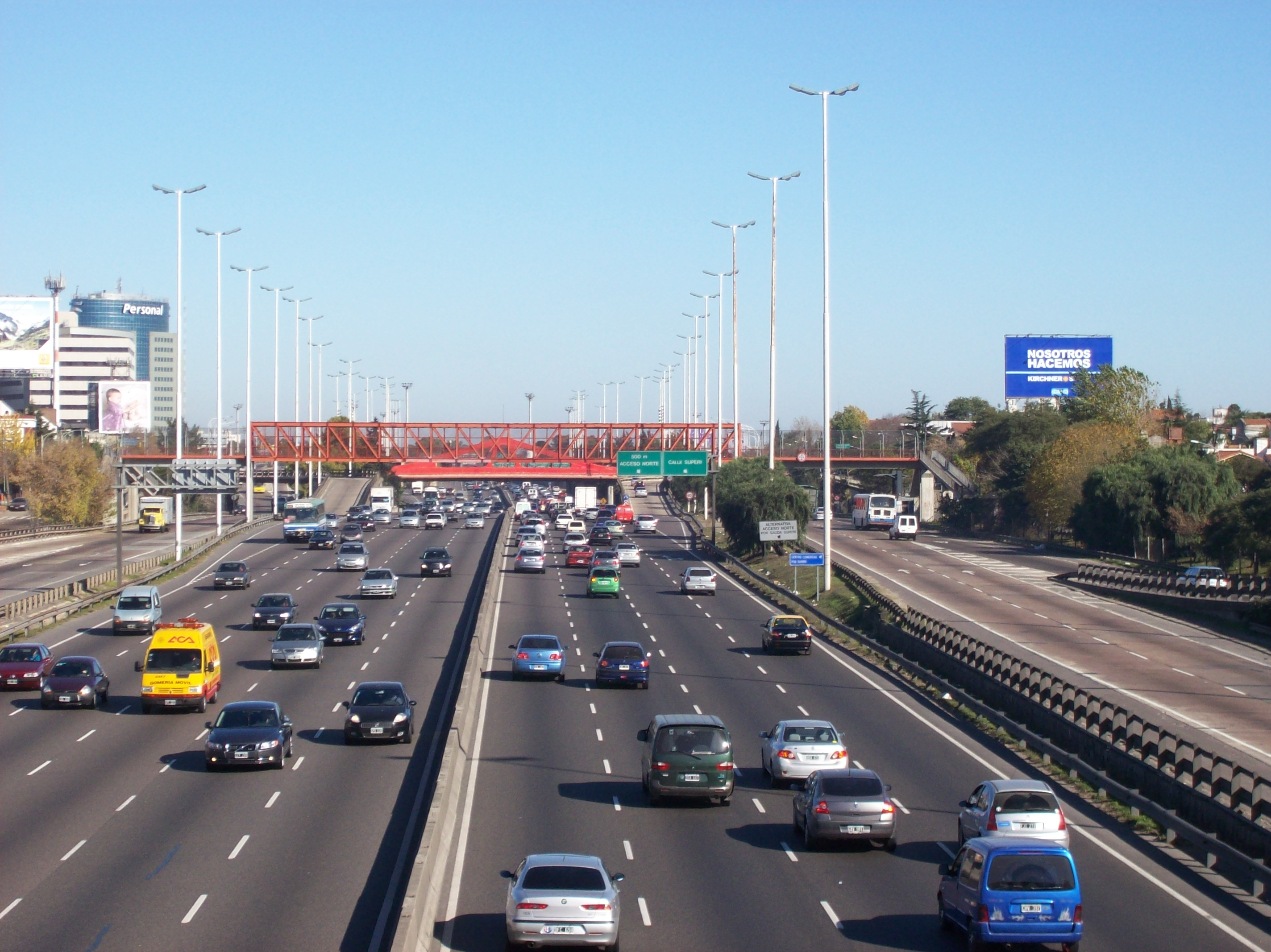 Avenida General Paz desde el puente de la calle Zapiola hacia el sudoeste. De lado izquierdo de la imagen se encuentra la Ciudad de Buenos Aires, mientras que del lado derecho está la Provincia de Buenos Aires.